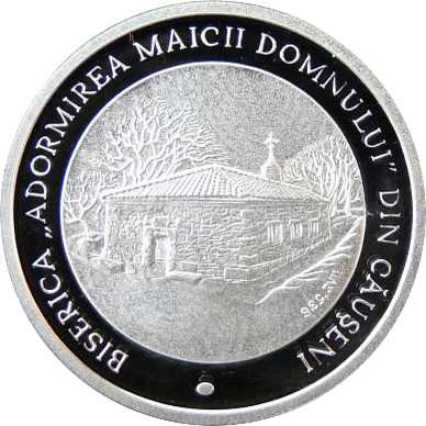 Реверс памятной монеты "Успенская церковь г. Каушаны"